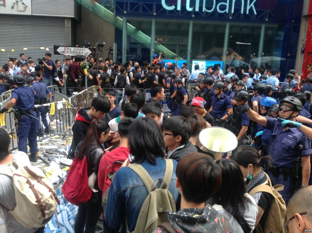 黄之锋等学生领袖11月26号在旺角被警方拘捕前